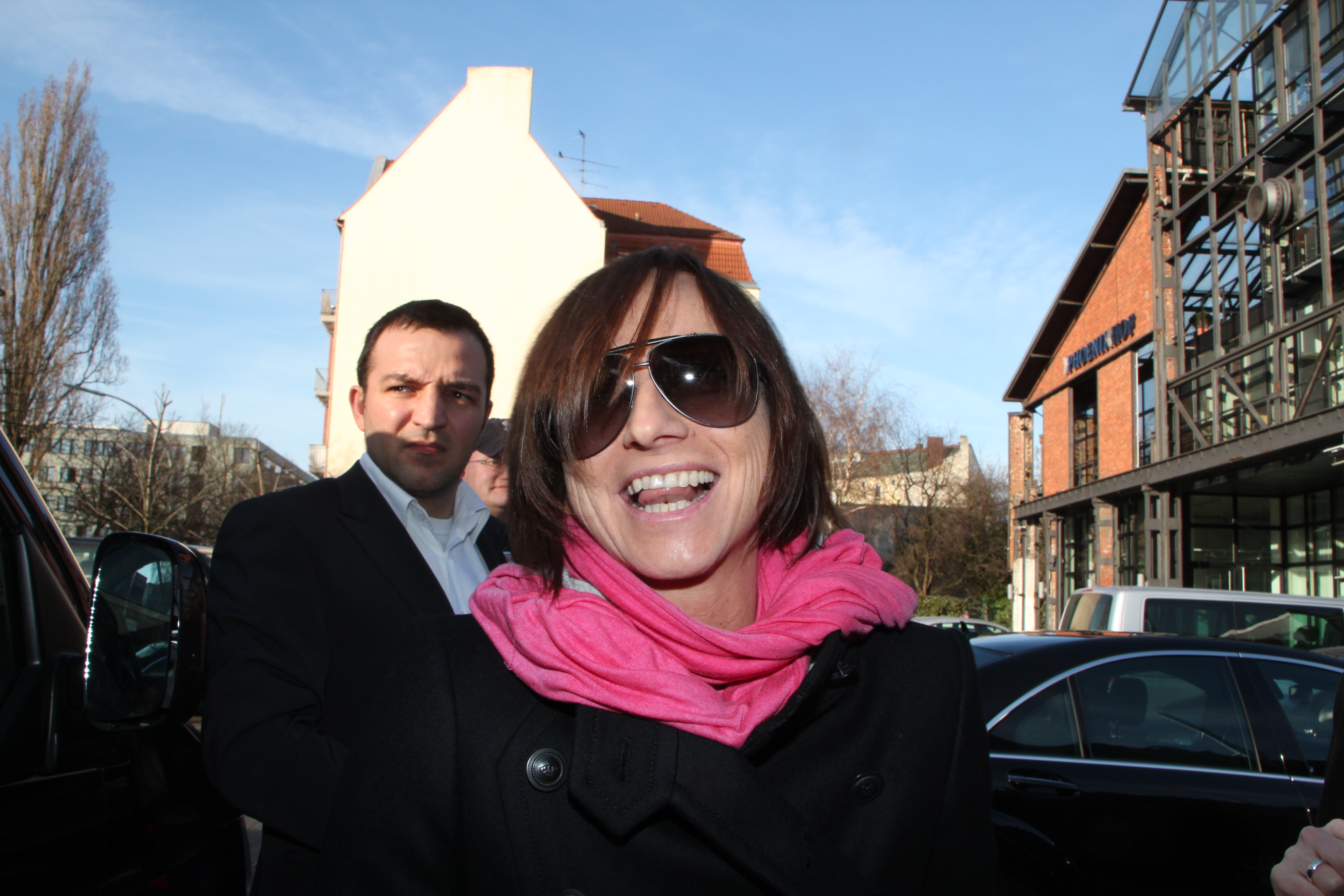 Gianna Nannini (* 14. Juni 1956 in Siena) ist eine italienische Songschreiberin und Rocksängerin.